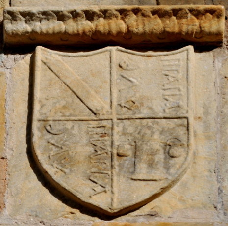 EscudoPolancoyLassodelaVegaSantillana